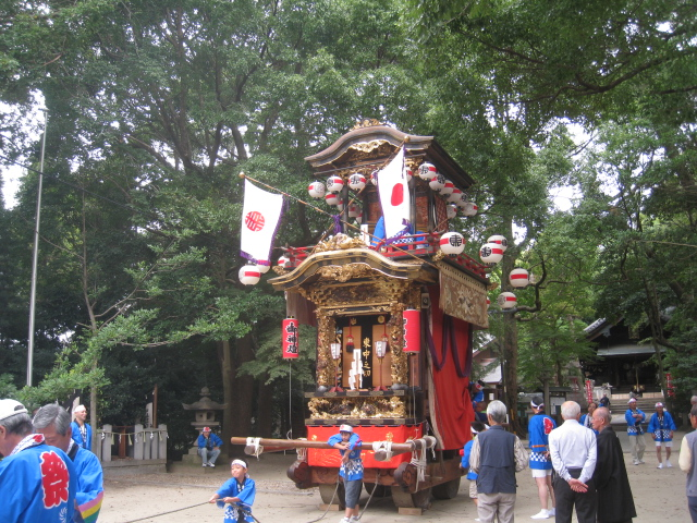 岡崎市 矢作神社例祭